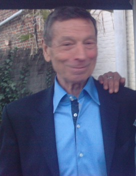 Henri (Rik) Van Looy (Grobbendonk, 20 december 1933), ook de keizer van Herentals genoemd, was een succesvol en populair Belgisch wielrenner. Hij won 493 wedstrijden. Op de rangschikking der beste renners aller tijden van Daniel Marszałek is Rik van Looy 11de (2004). -- links